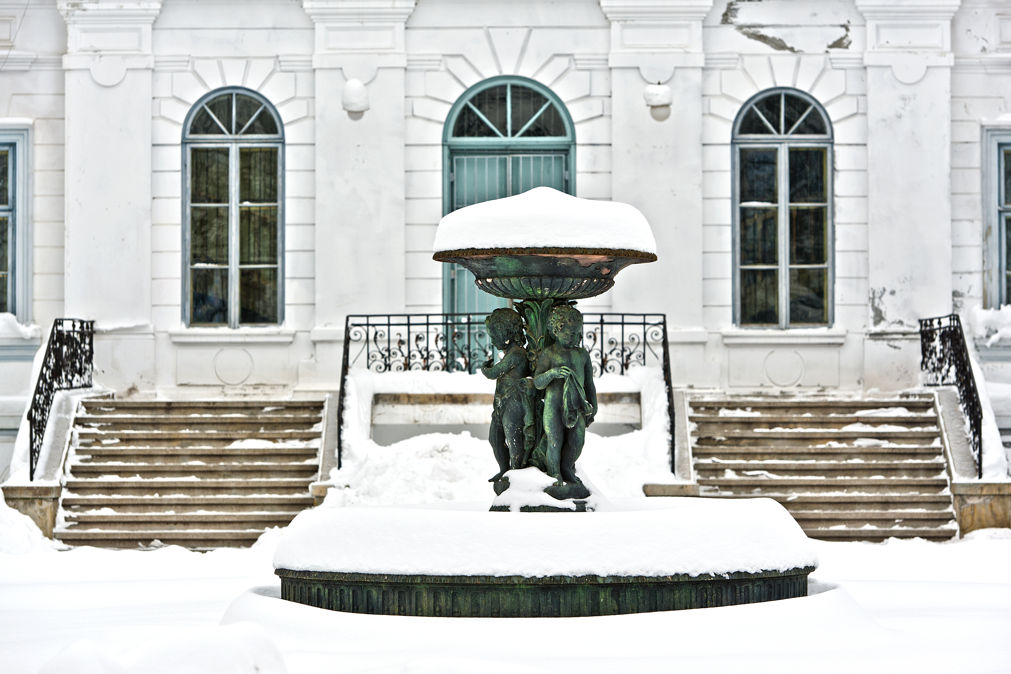 Ansamblul fostului palat Alexandru Ghica